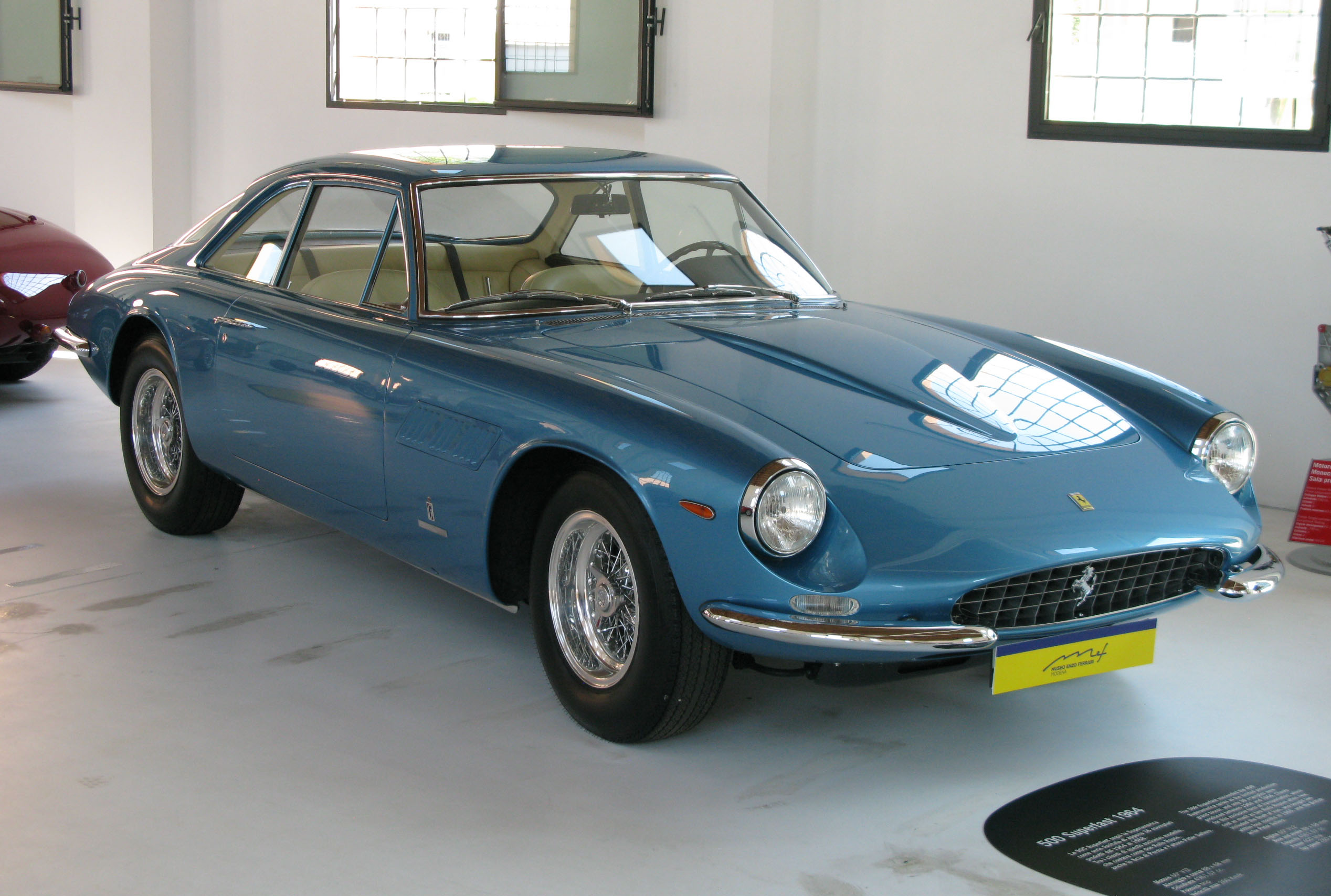 Ferrari 500 Superfast